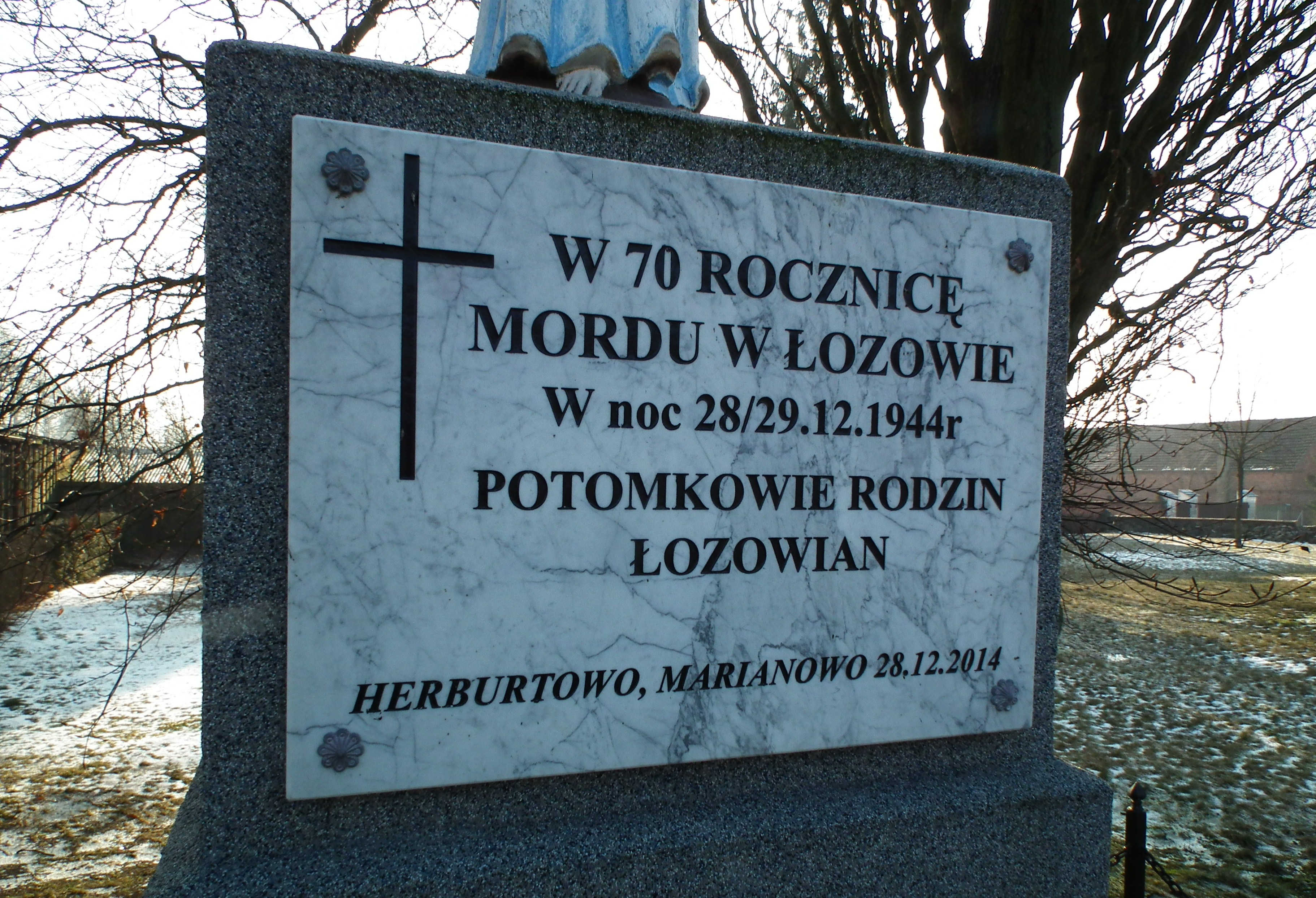 Figura i tablica upamiętniająca mord w Łozowej (1944). Herburtowo, przy kościele.